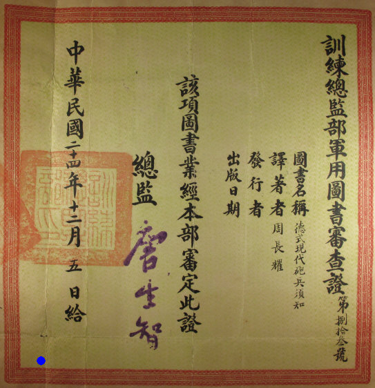 中華民國國民政府軍事委員會訓練總監部軍用圖書審查證，圖書名稱《德式現代砲兵須知》，作者周長耀。中華民國24年（1935年）12月5日給。